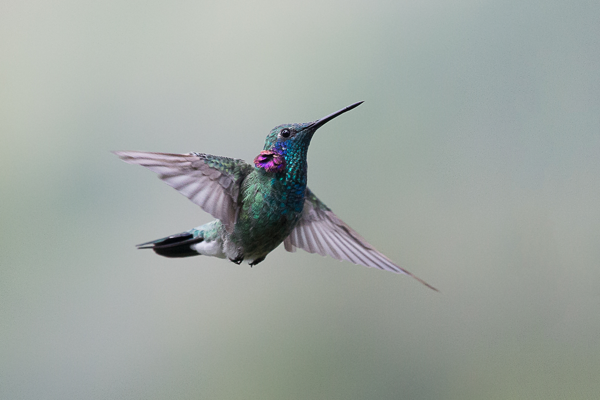 Beija-flor-de-orelha-violeta